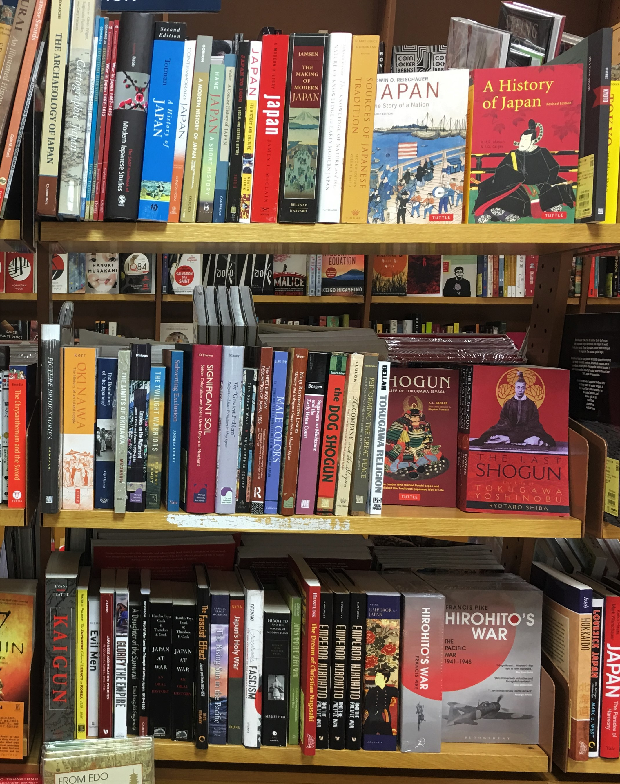 History books about Japan in a bookshop in Tokyo